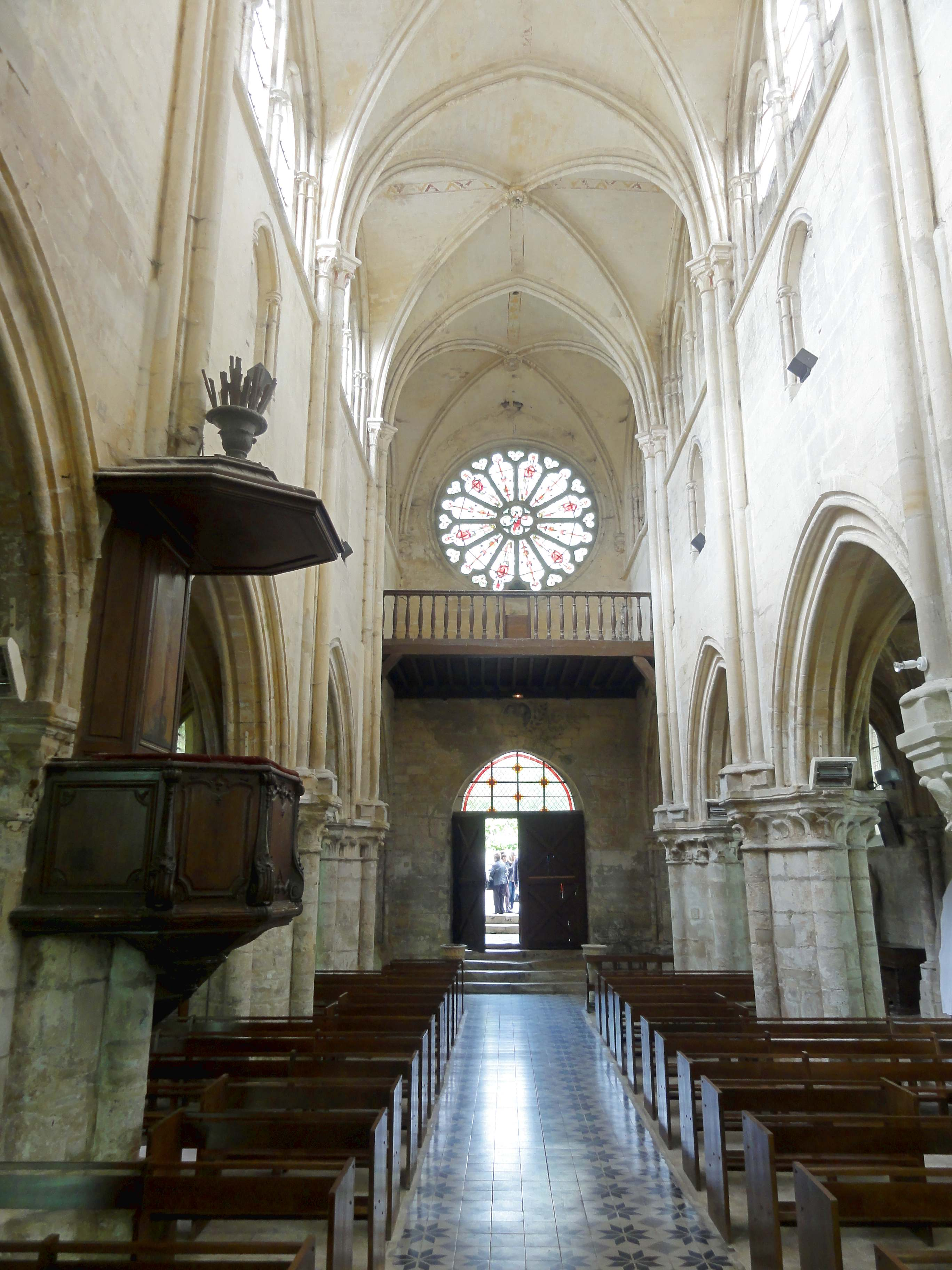 Intérieur de l'église Saint-Martin de Cires-lès-Mello (voir titre).